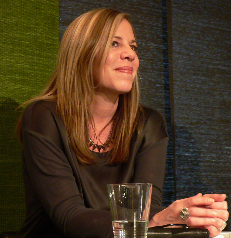 Alyson Noël bei einer Lesung in Hannover